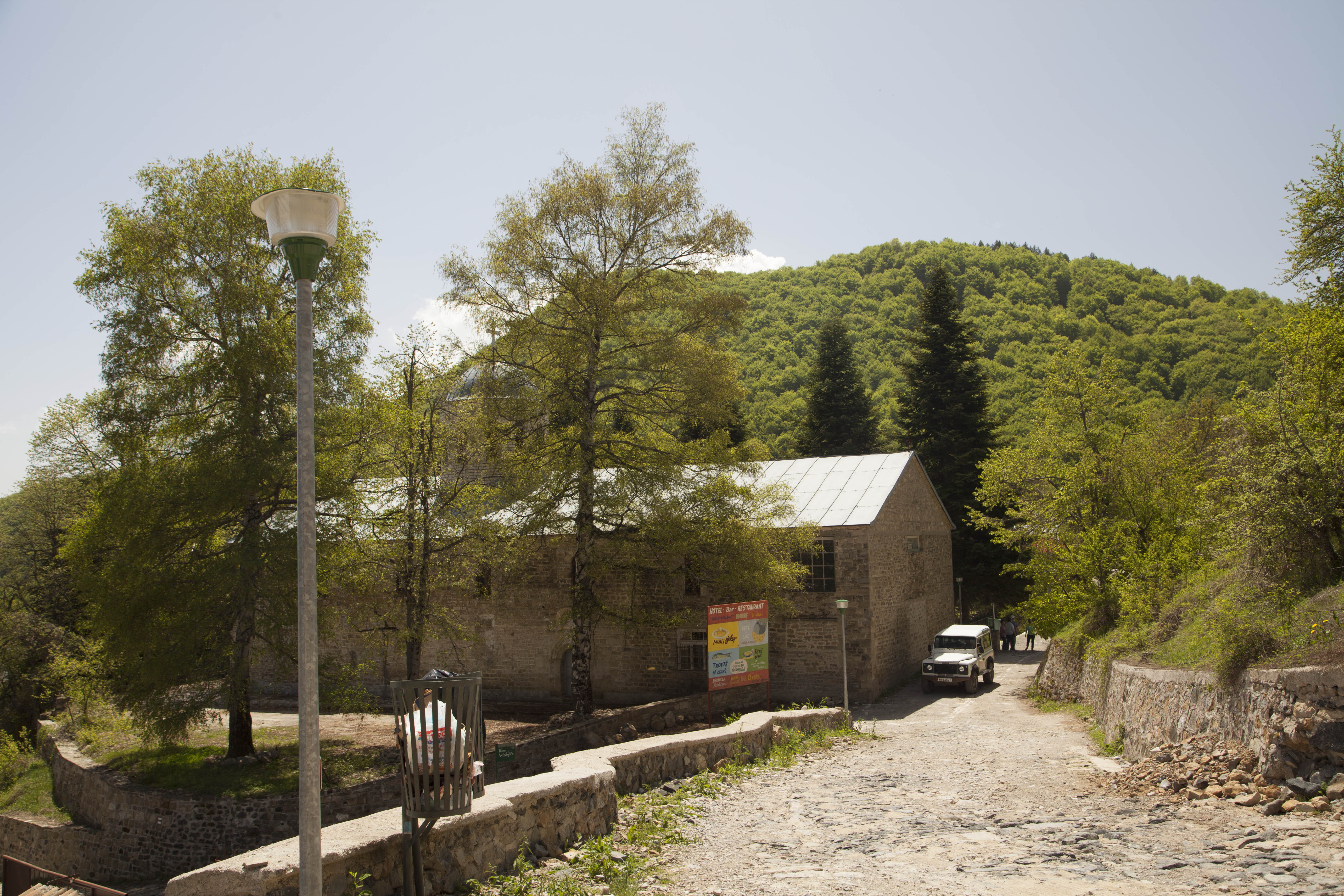 Dardhe, Albania